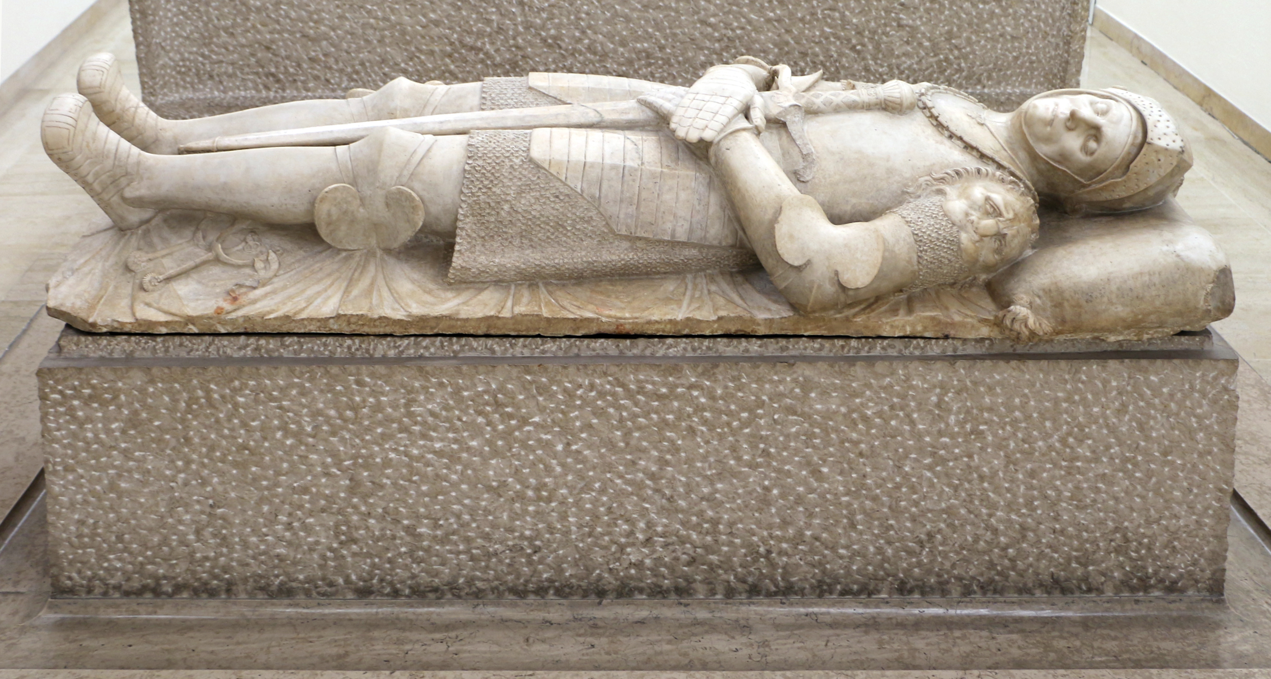 Pinacoteca di Ravenna This is a photo of a monument which is part of cultural heritage of Italy.